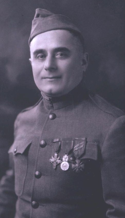 Coronel Sam Dreben